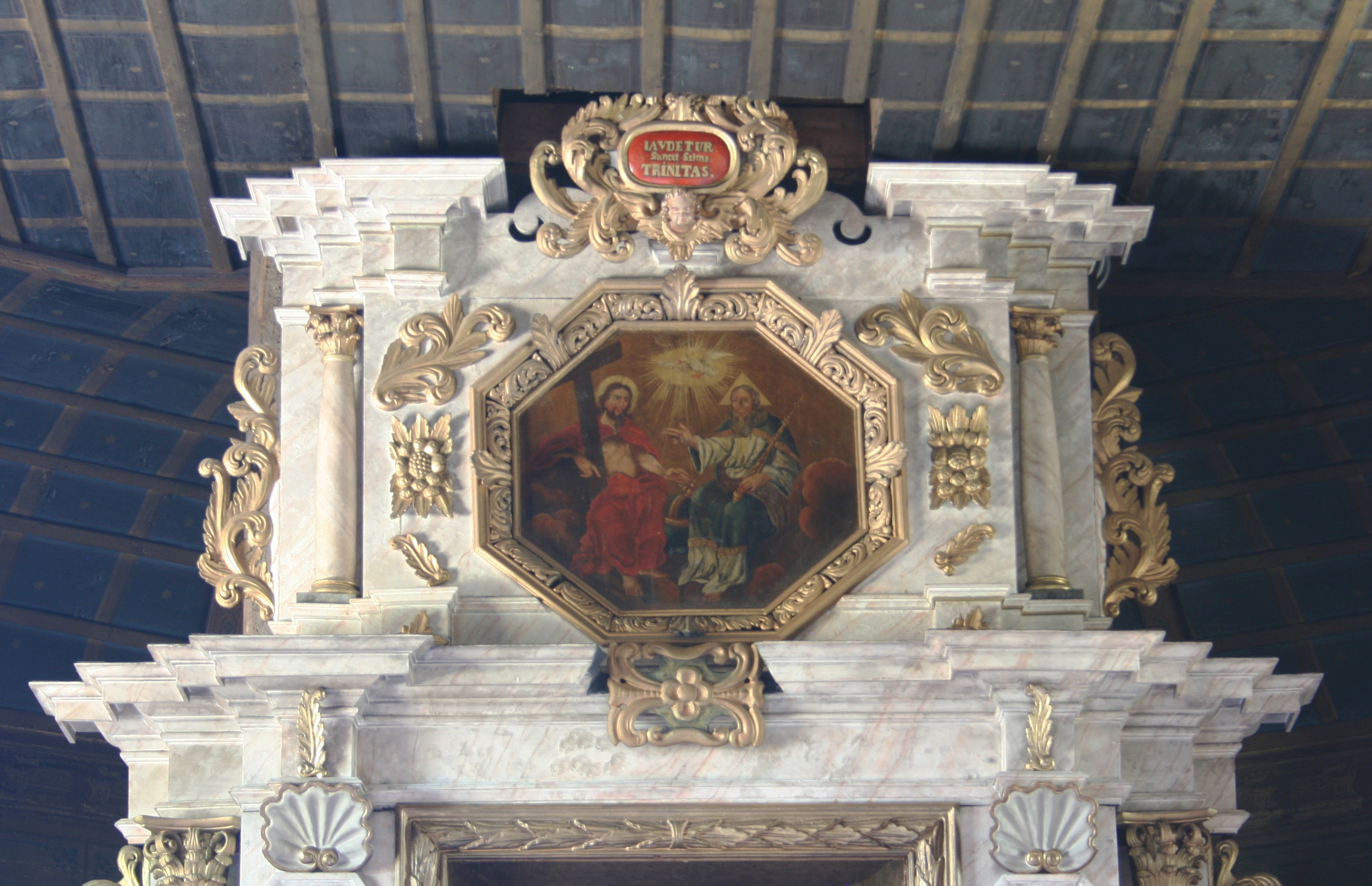 Ołtarz główny o kościele św. Trójcy w Koszęcinie - detal